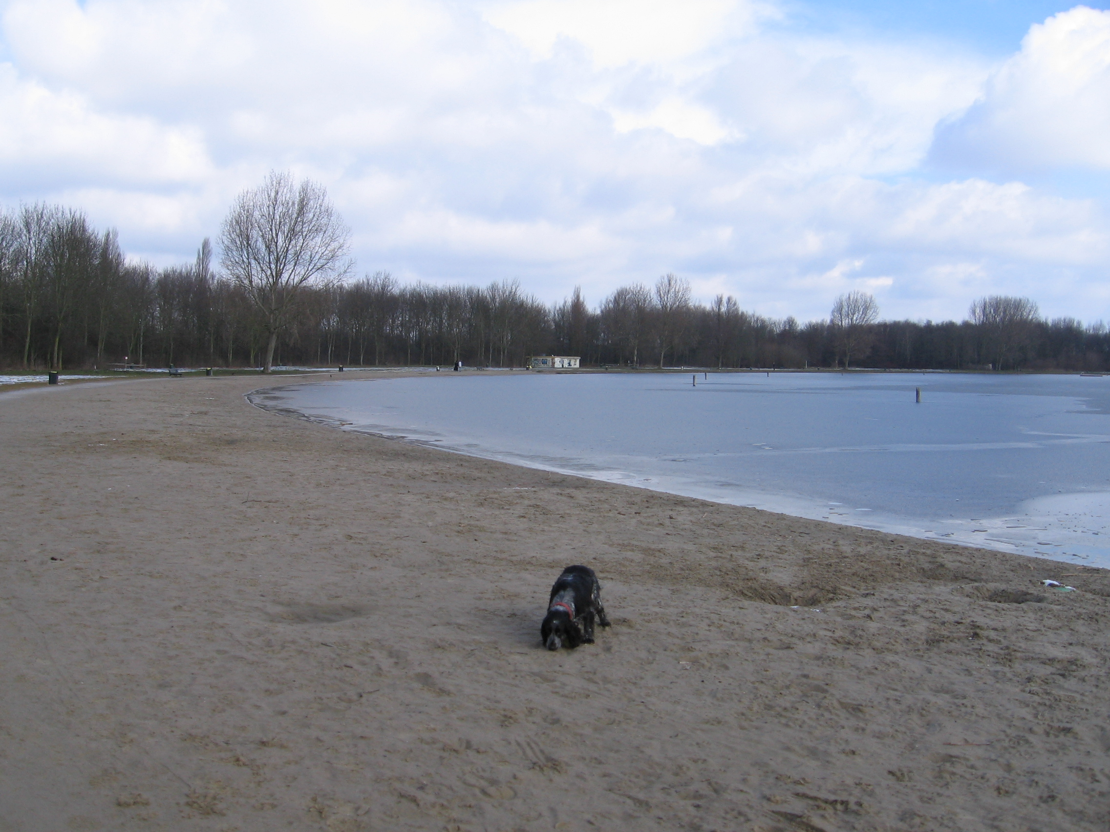 Delftse Hout, maart 2006